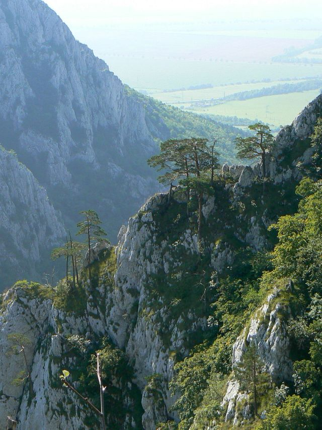 Ústie Zádielskej tiesňavy - pohľad do Turnianskej kotliny v Slovenskom krase zo severozápadu. Neprístupné skalné útvary pokrýva pôvodný vegetačný kryt.